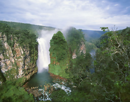 cataratas Arcoiris (80 m.) en el parque Nacional Noel Kempff Mercado (Bolivia).